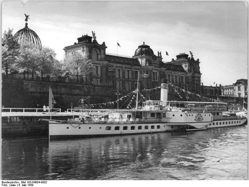 Dresden, Brühlsche Terrasse, "Weiße Flotte", Ausflugsschiff Zentralbild Löwe 6.5.1959 Dresden- Die Brühlsche Terrasse. Vom Terrassenufer aus fahren die Schiffe der Weissen Flotte in die Sächsische Schweiz sowie Elbeabwärts bis Torgau. Im Hintergrund das große Gebäude die Hochschule für Bildende Künste.